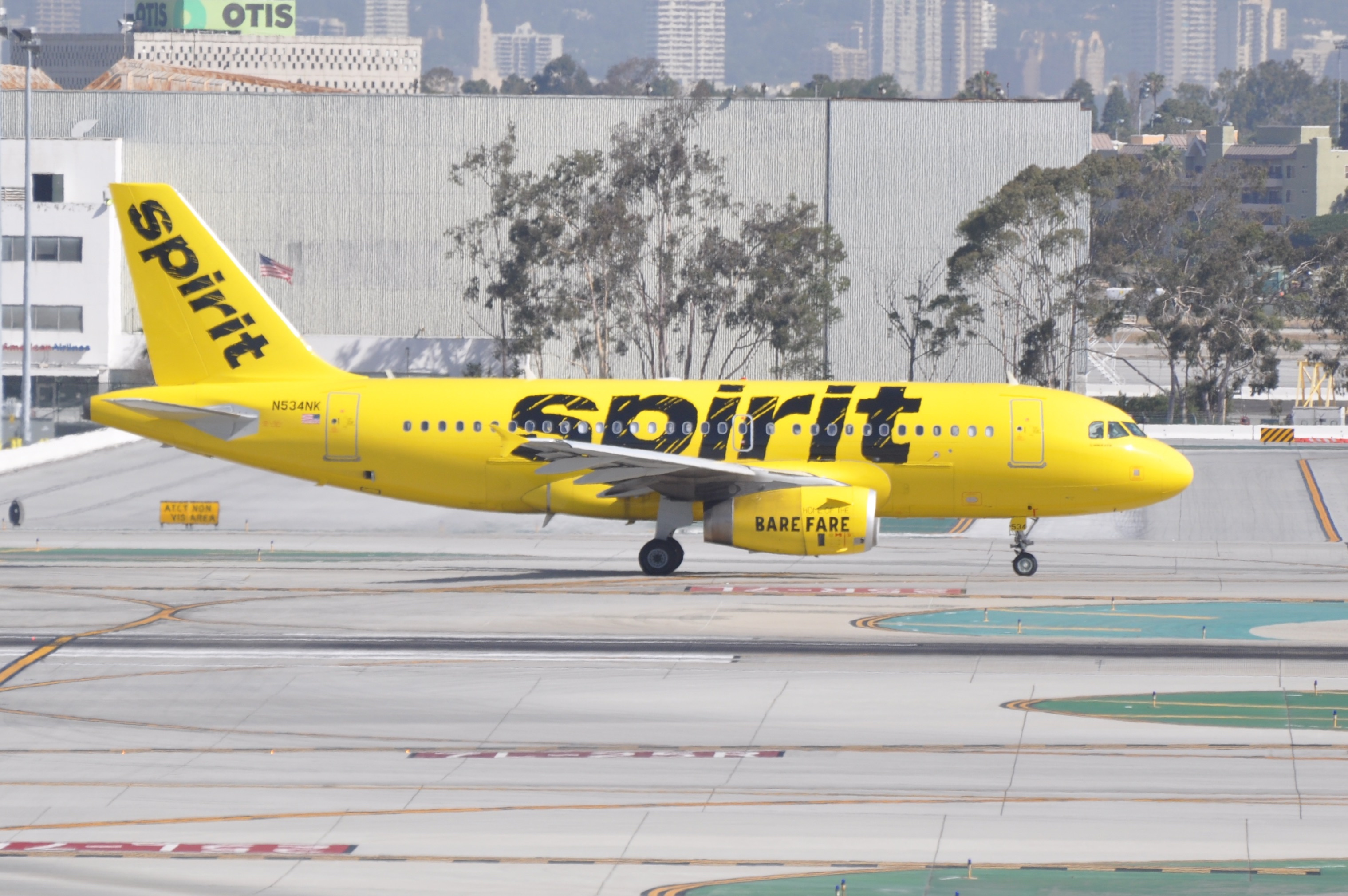 MSN 3395 A319-132 Spirit Airlines LAX.